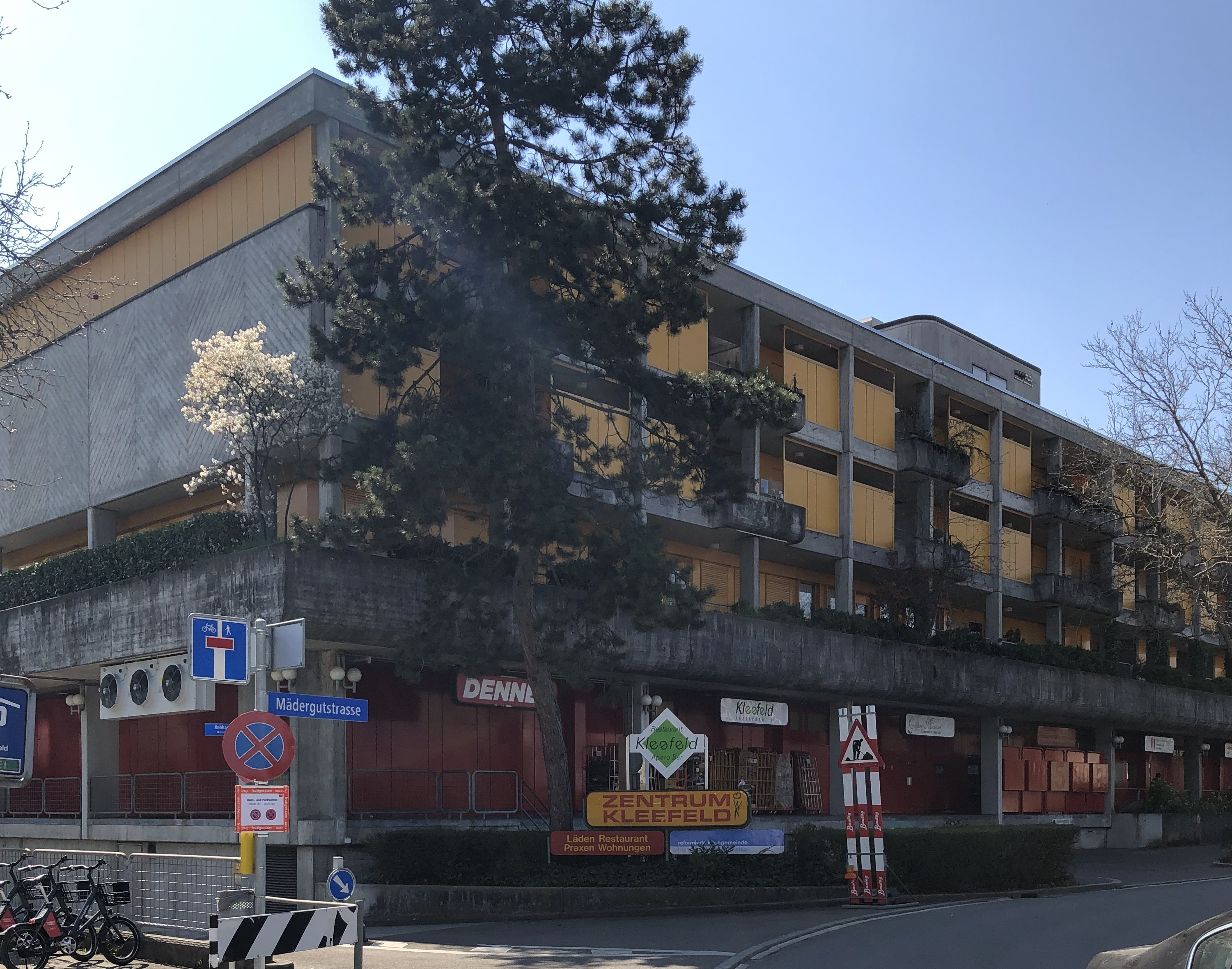 Kleefeld Zentrum